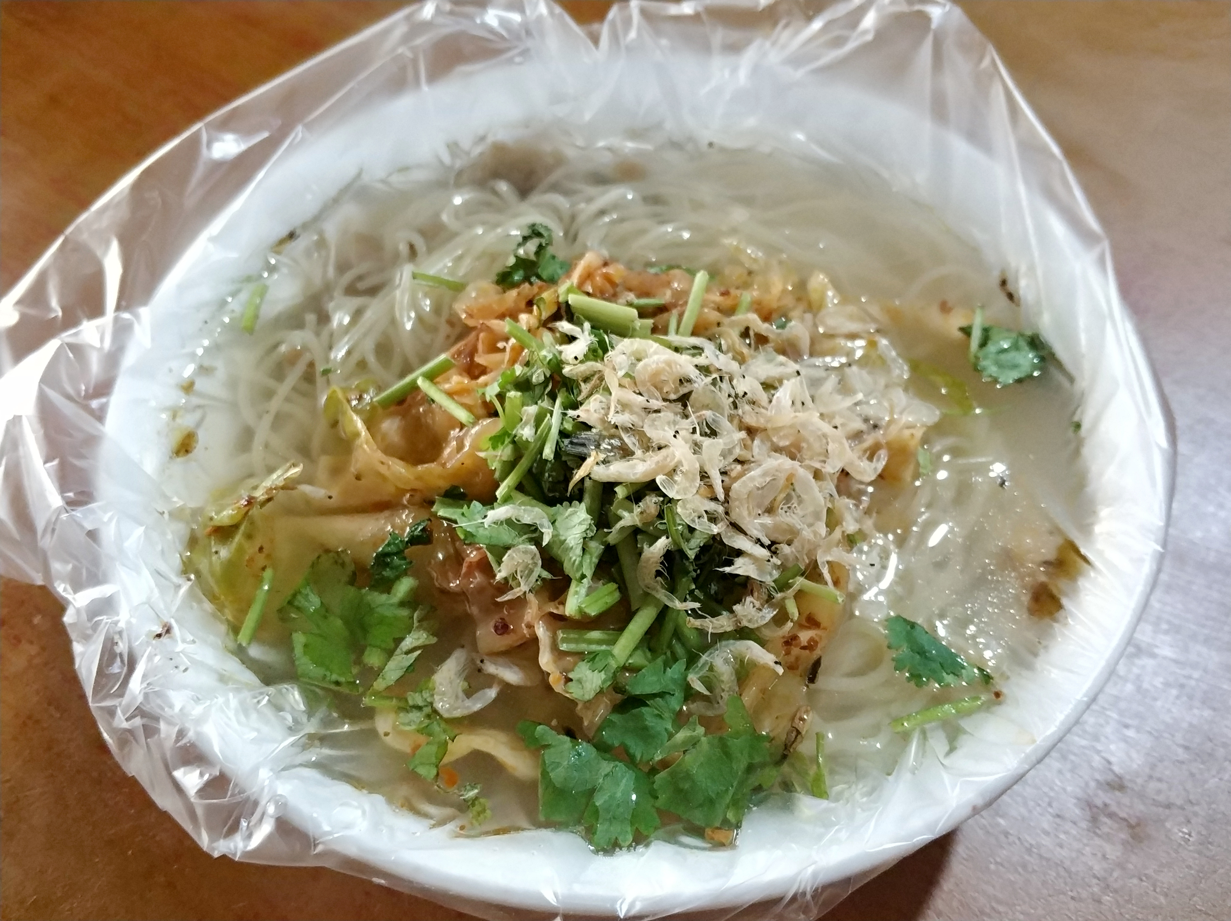 中文（中国大陆）: 河北省唐山市路北区